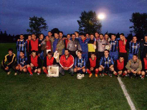 nogometni klub Nogometni klub "Petlovac" Petlovac, Petlovac